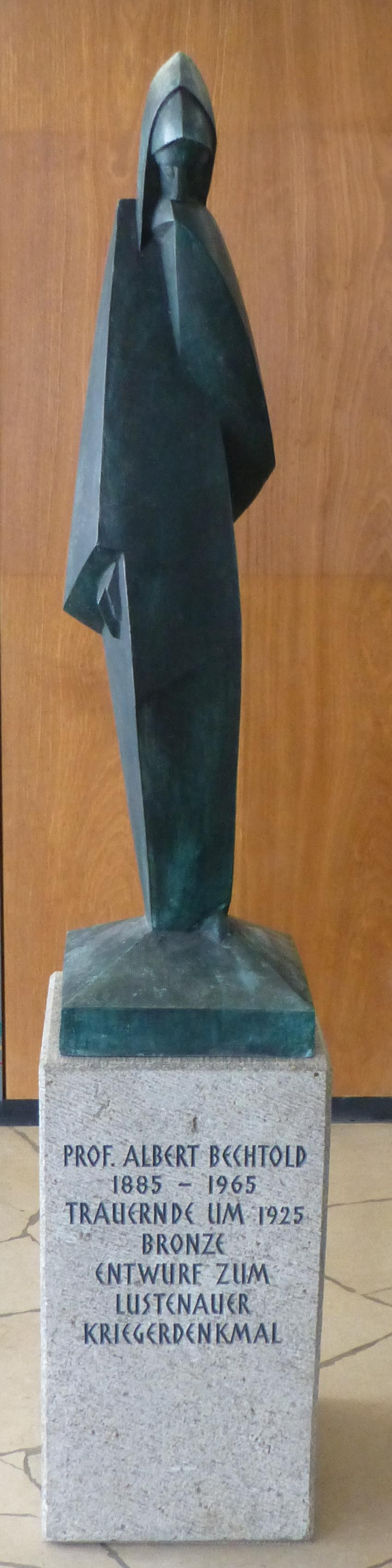 Ursprünglicher, von der Gemeindevertretung abgelehnter Entwurf für das Lustenauer Kriegerdenkmal von Albert Bechtold, jetzt ausgestellt im Lustenauer Rathaus